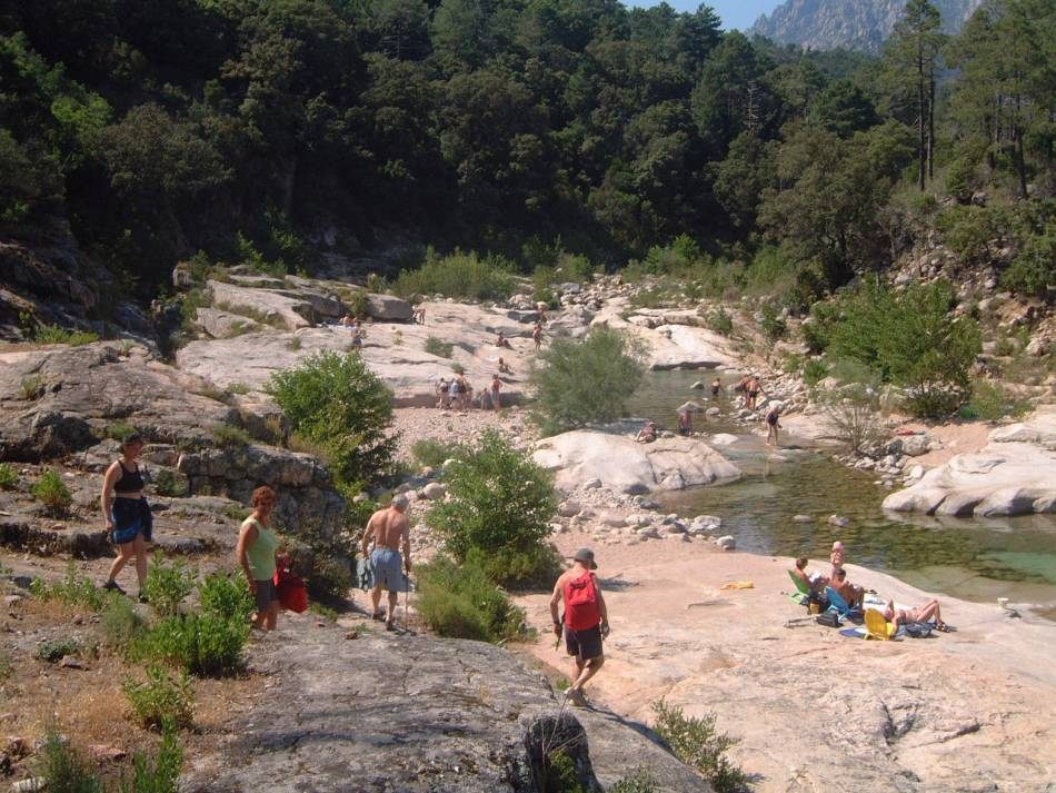 Le long de la rivière Cavo en Corse du Sud